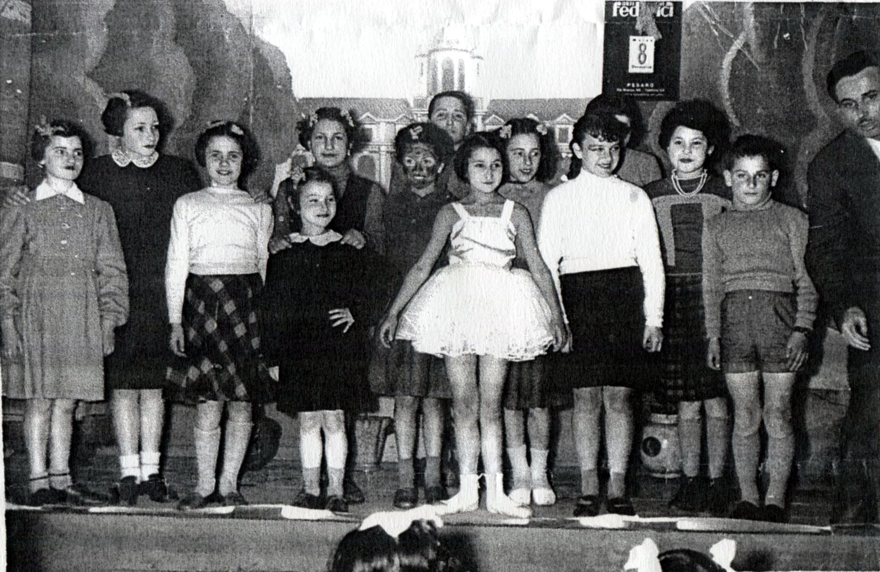 Rappresentazione teatrale dell'Associazione Falchi Rossi Italiani, gruppo di Pesaro. Salone Pro Pace, Via Barignani, 2, Pesaro. La fotografia è stata scattata da Luciano Trebbi.